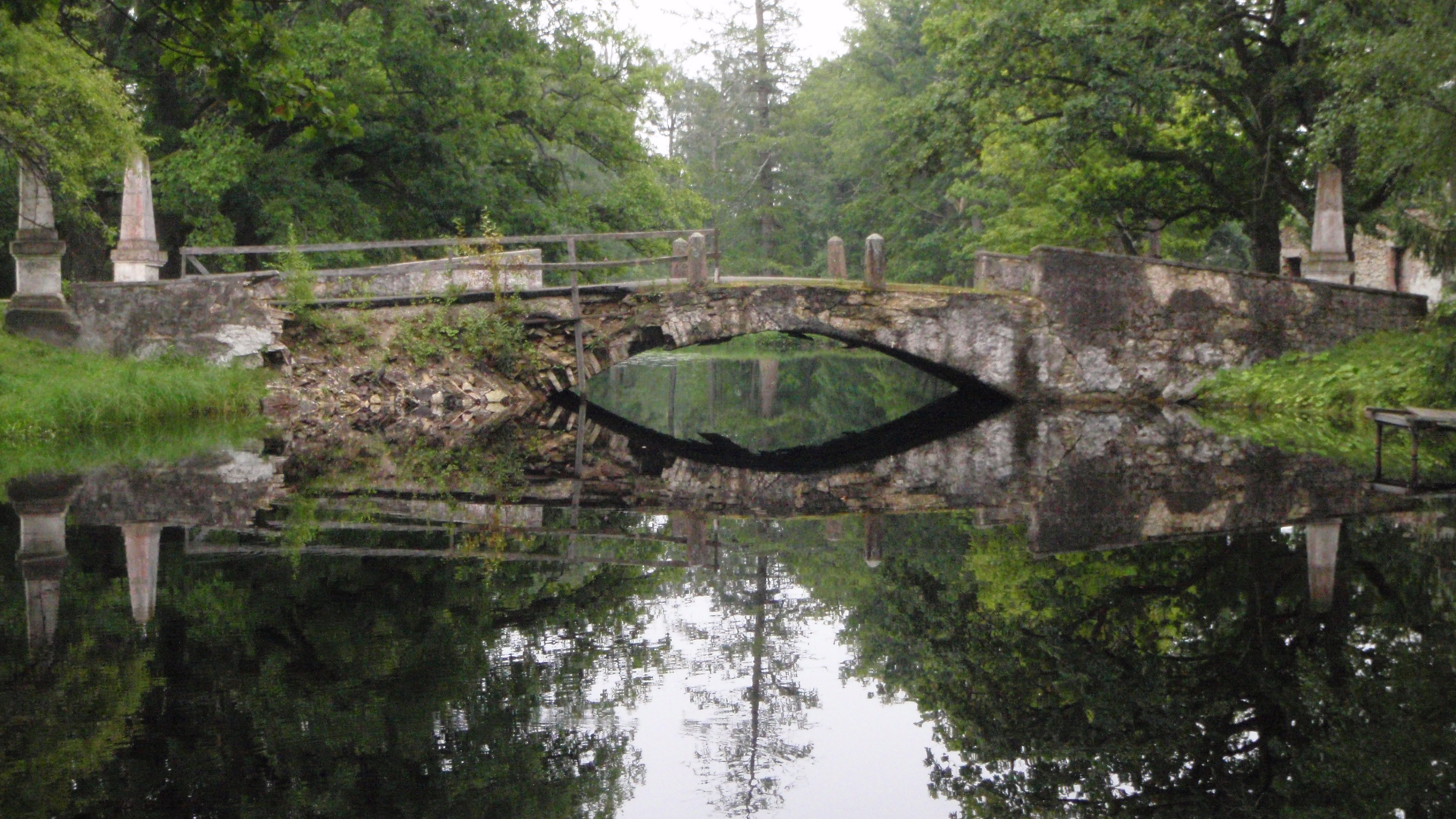 Koluvere mõisa peasild